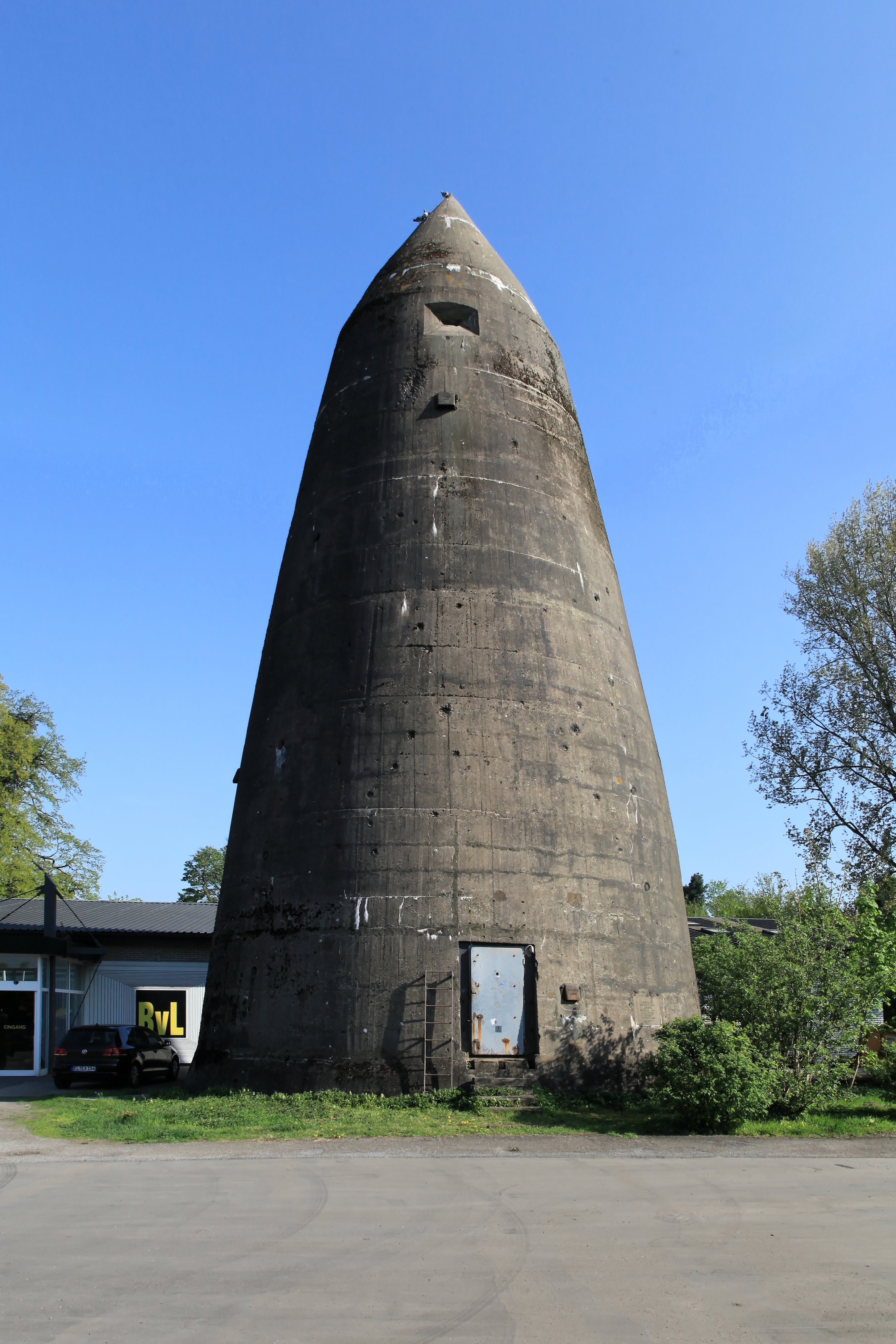 Winkel-Hochbunker, Lindenstraße in Lingen (Ems)